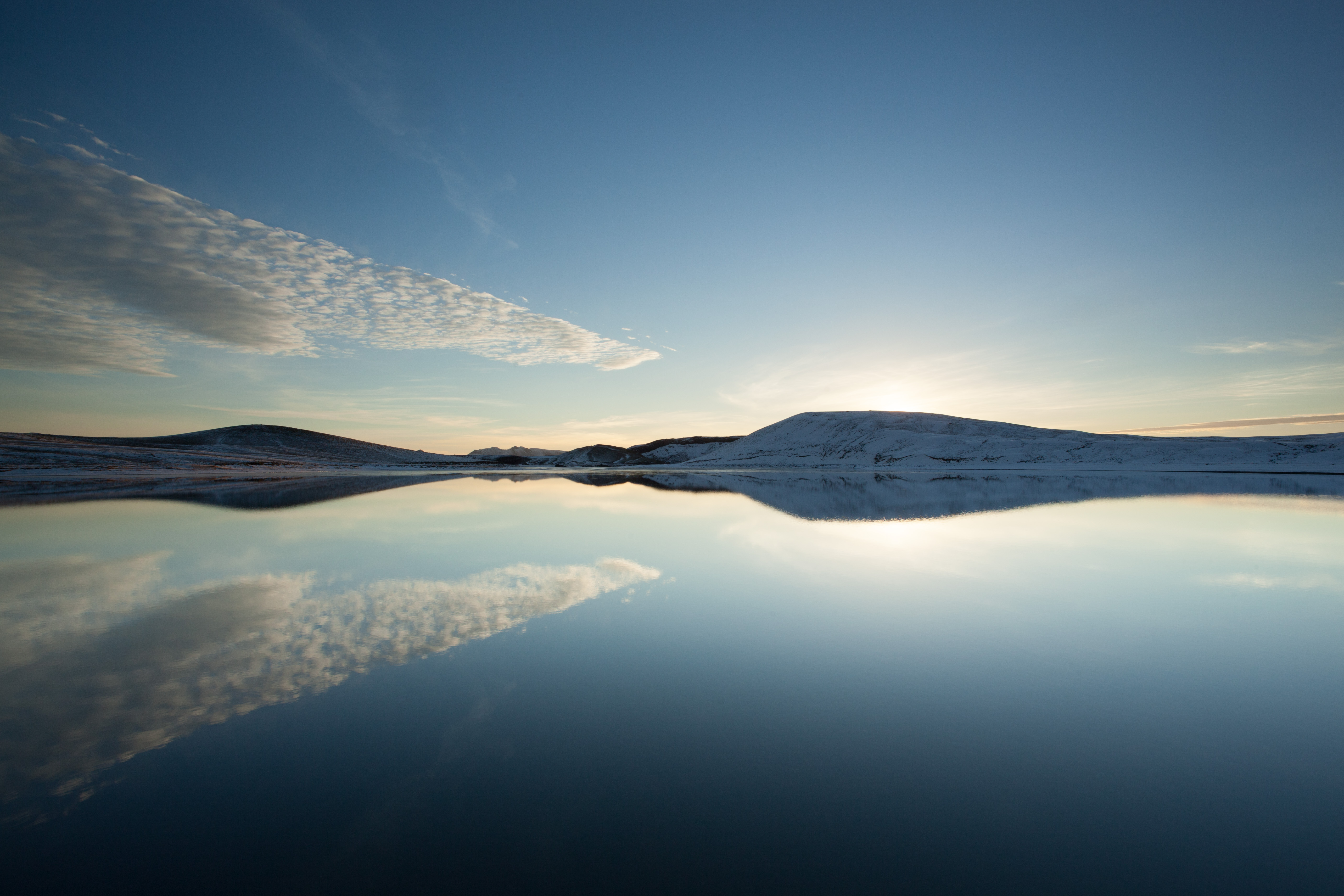 Grænavatn Greenlake Veiðivötn Iceland